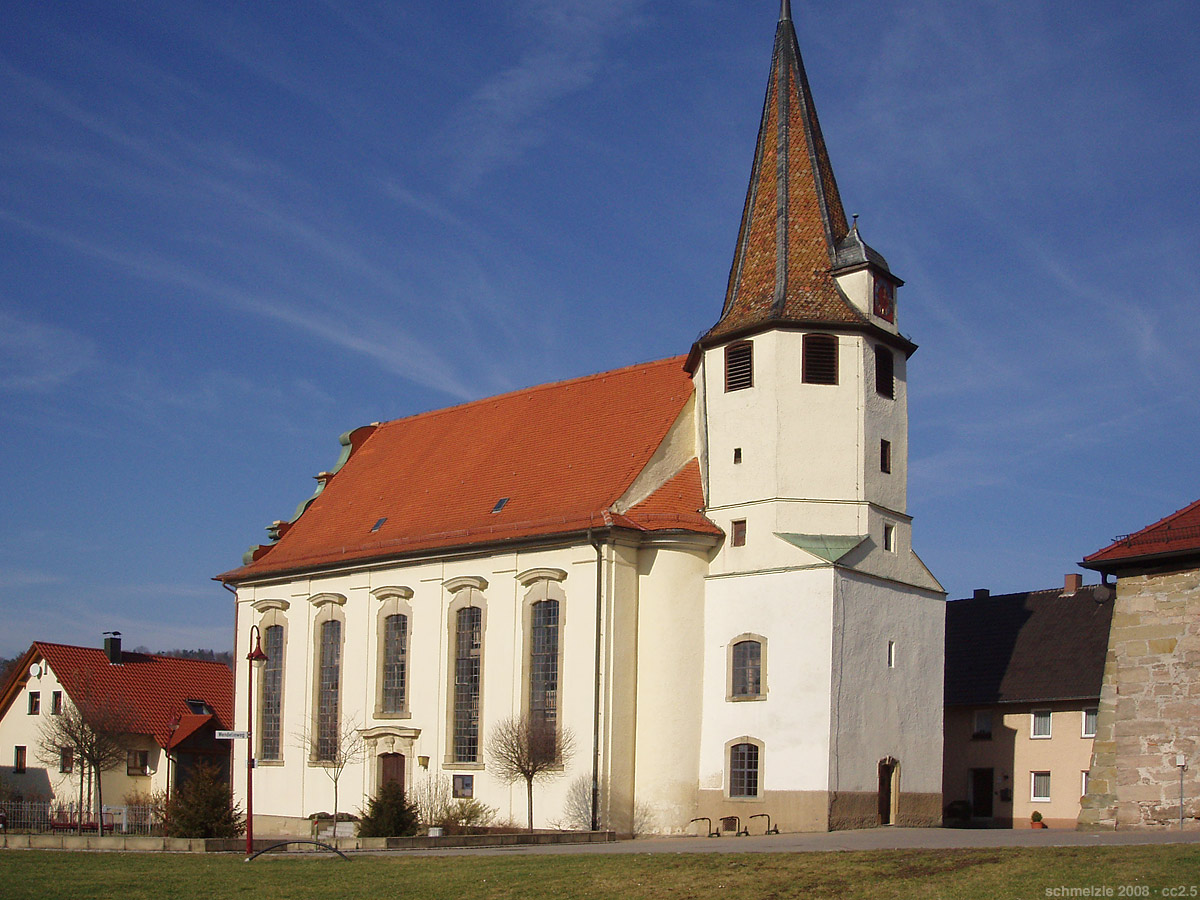 Pfarrkirche St. Wendelin in Obersulm-Eschenau, erbaut 1565-85, in barockem Stil erneuert 1756, jedoch wieder schlichter ausgestaltet bei Renovierung 1959. Mit Fresken und Figuren aus dem 15. Jahrhundert.